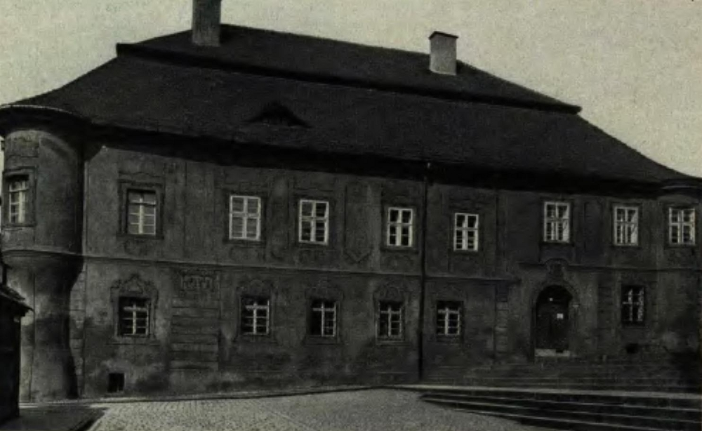 Städtisches Museum und Stadtbücherei in Oppeln (Heute Museum des Oppelner Landes)